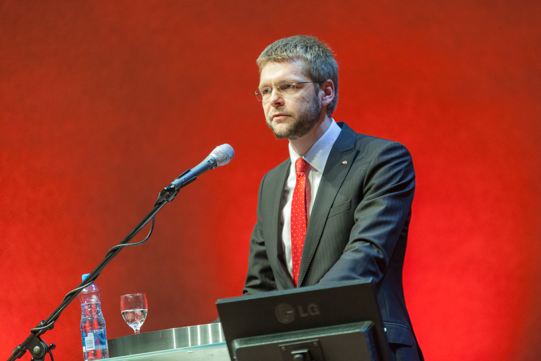 30. mail 2015 valis SDE üldkogu Jevgeni Ossinovski erakonna esimeheks.